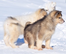 Kalaallisut: Qimmiaqqat